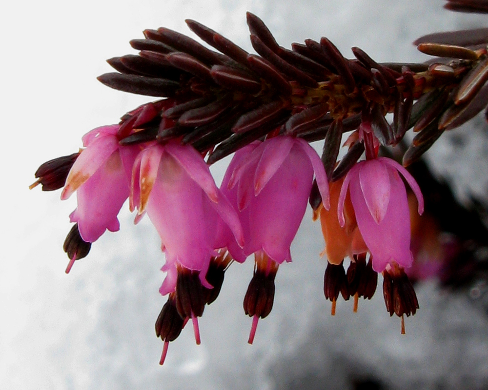 Beschreibung kommt noch